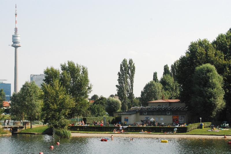 Das Strandbad Angelibad oder kurz nur Angelibad ist ein städtisches Sommerbad am rechten Ufer der Alten Donau im 21. Wiener Gemeindebezirk Floridsdorf unterhalb des Floridsdorfer Wasserparks.